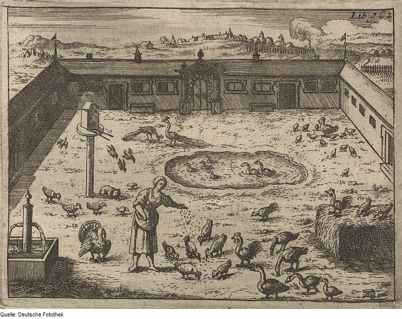 Original image description from the Deutsche Fotothek Landwirtschaft & Nutztierhaltung & Geflügel